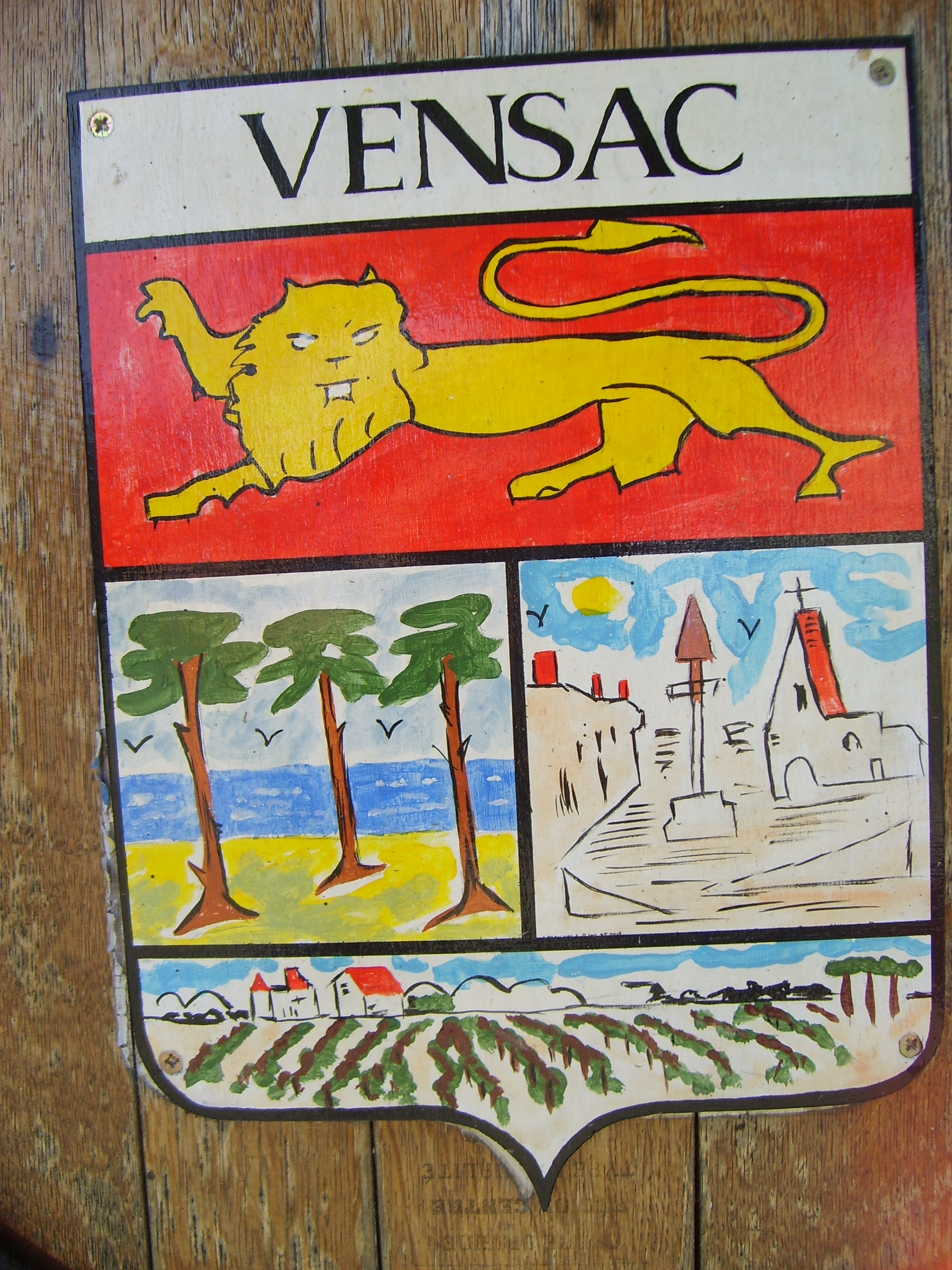 Blason de Vensac (Gironde, France)